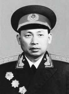 李天佑将军授勋照